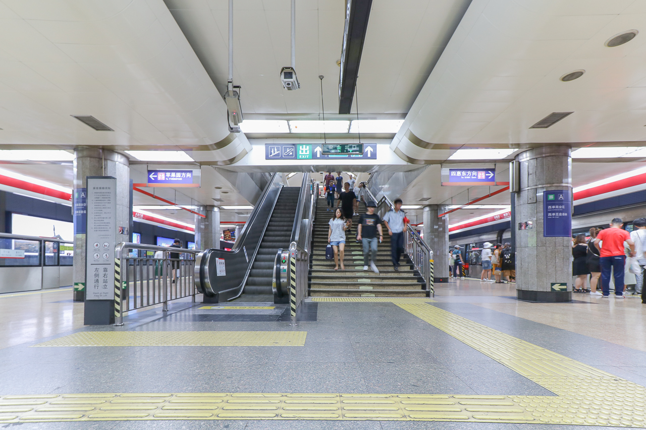 中文（中国大陆）: 北京地铁1号线西单站站台楼梯